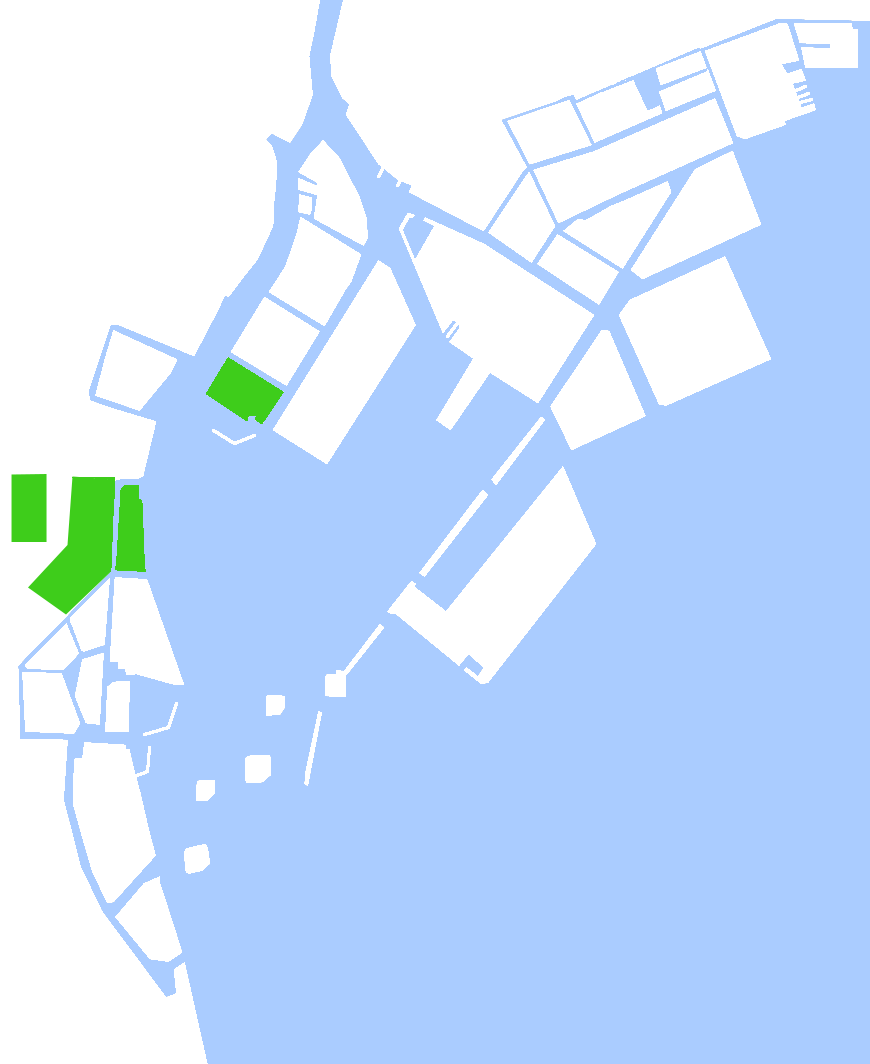 1906年～1913年に行われた第一期の隅田川口改良工事の対象地域